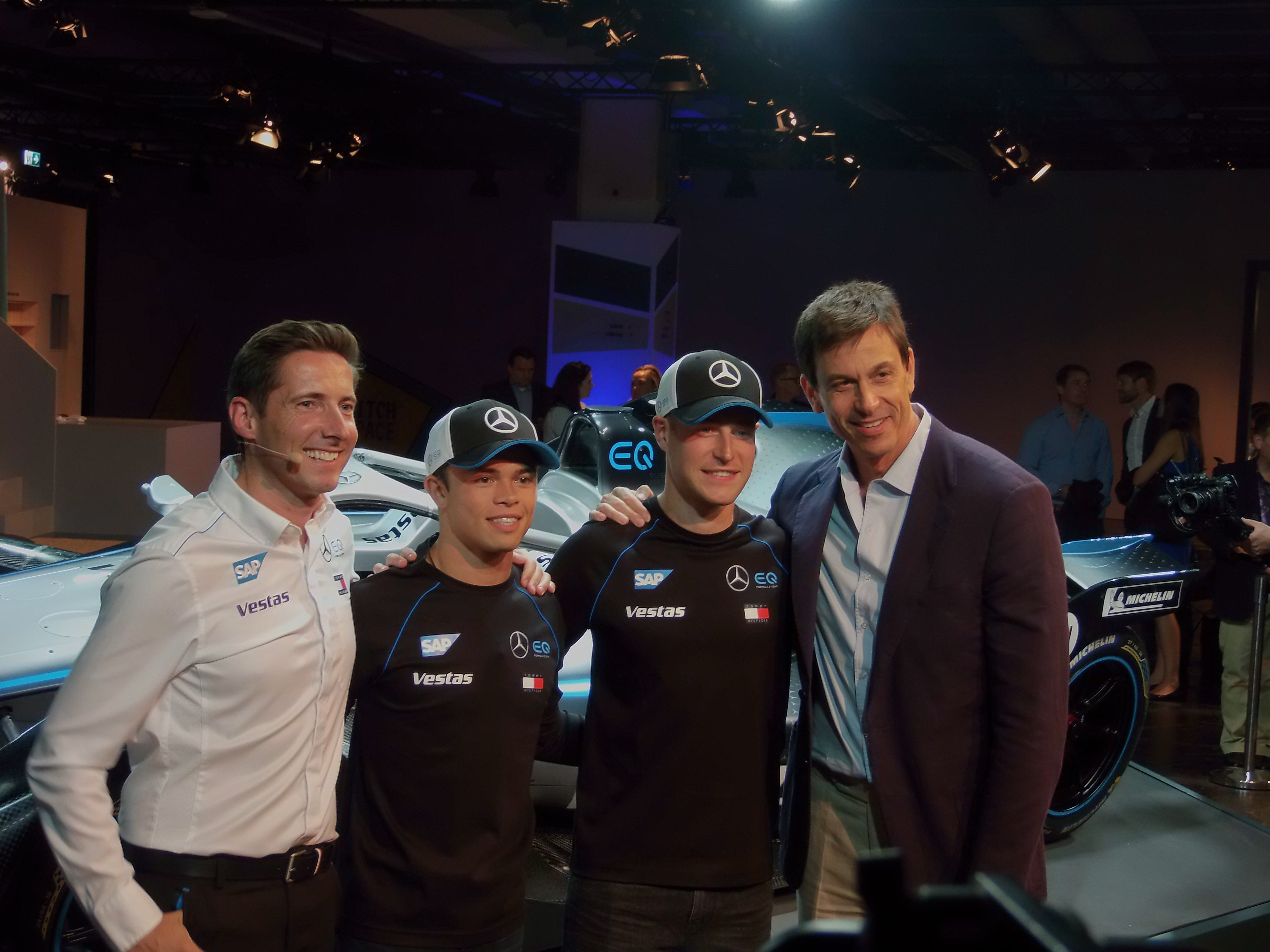 Ian James, Nyck de Vries, Stoffel Vandoorne und Toto Wolff bei der Teampräsentation des Mercedes-Benz EQ Formula E Teams auf der IAA 2019, im Hintergrund der Mercedes-Benz EQ Silver Arrow 01